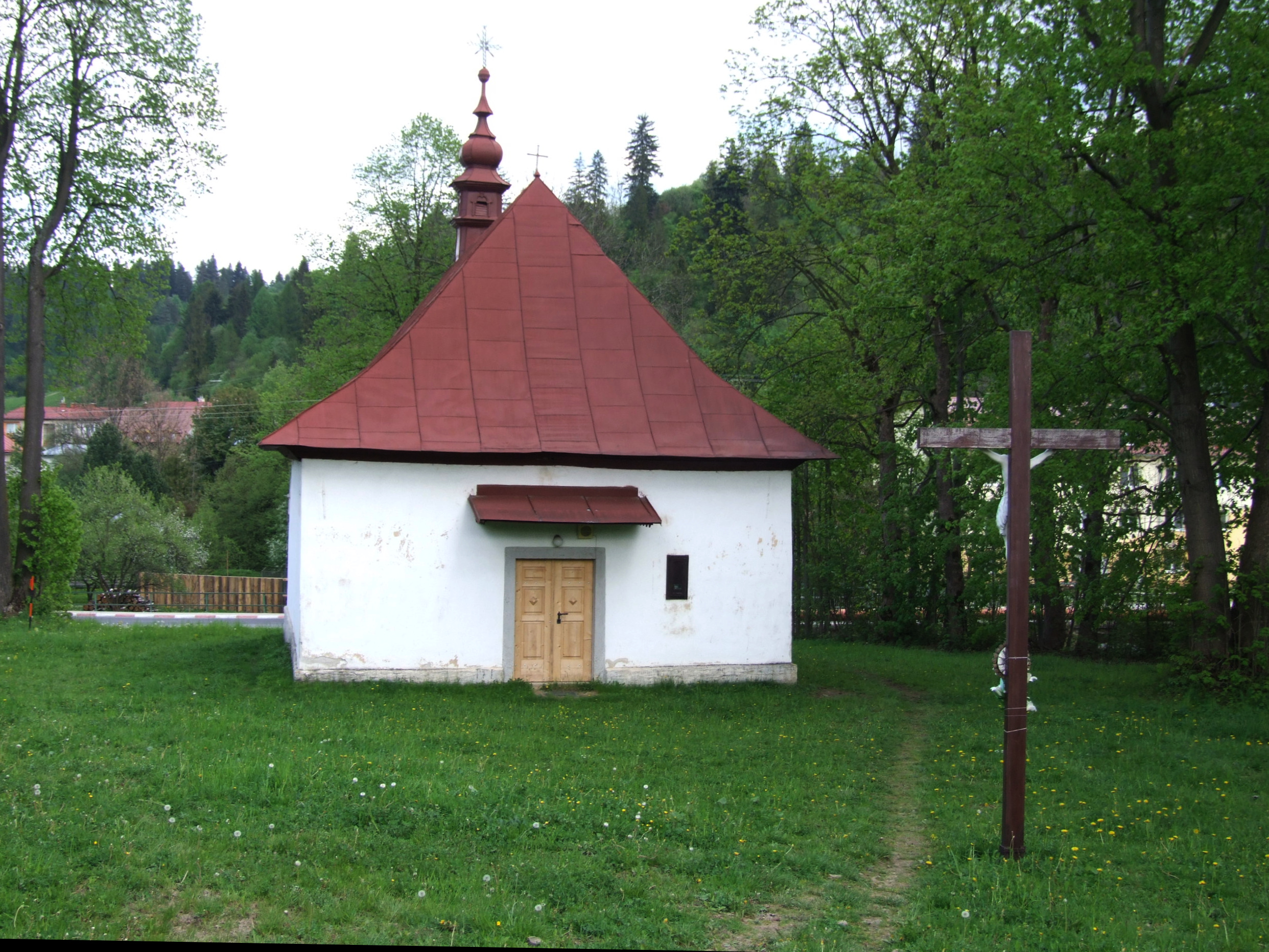 Spišske Hanušovce